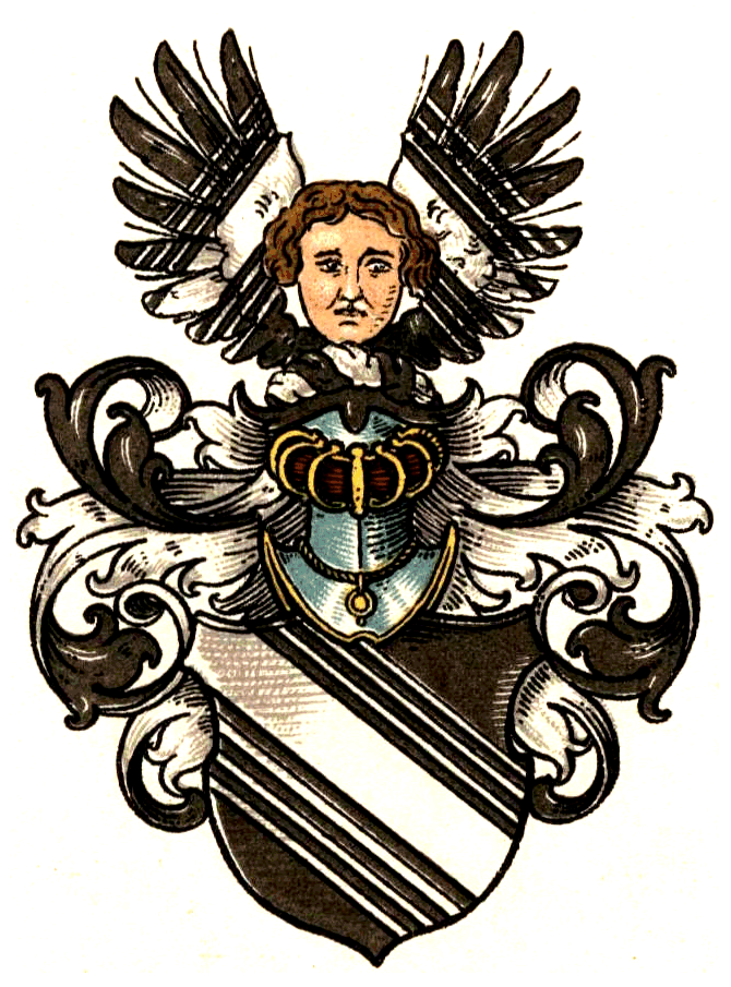 Wappen der von Heygen